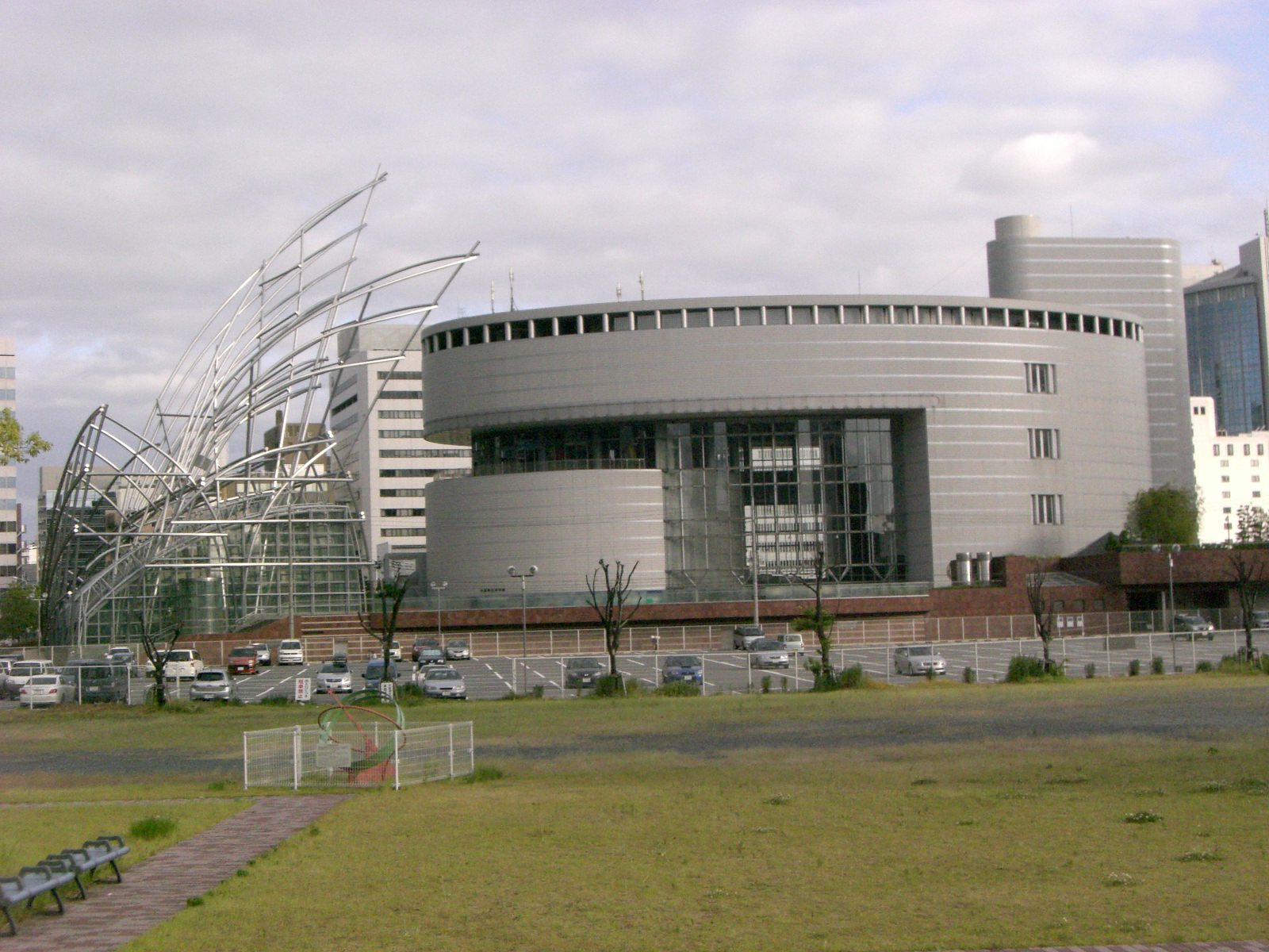 Osaka_Science_Museum